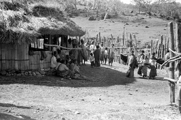 Negatief. Dansende vrouwen te Nenas